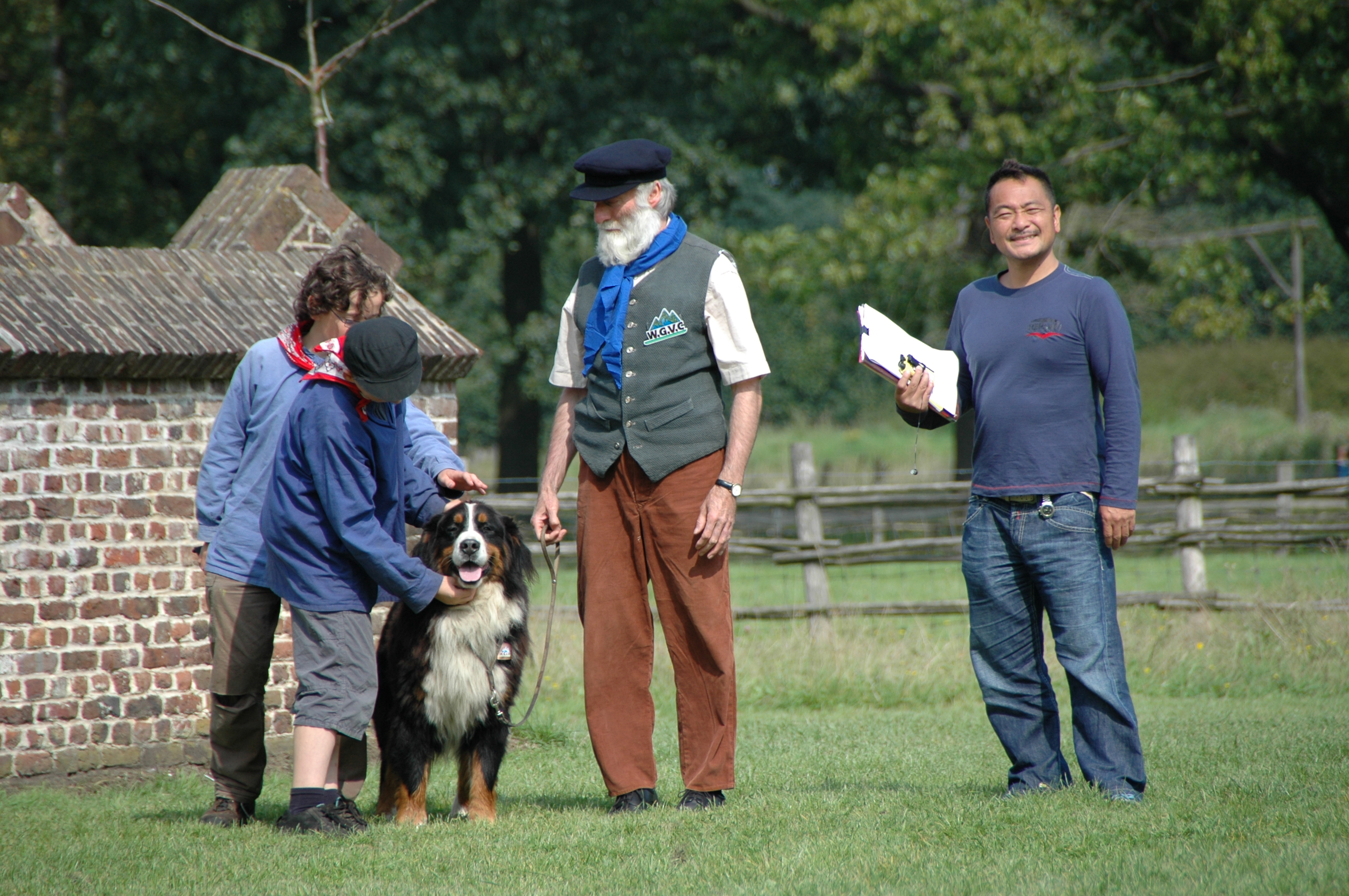 Openluchtmuseum Bokrijk als filmset, Dog of Flanders / Flanders no Inu, Fuji-TV, Japan, opnames docu-soap voor Fuji-TV, opa Johan